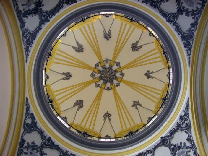 Cúpula de la Iglesia de Santa Eulalia (siglo XVIII). Murcia. (Región de Murcia. España).